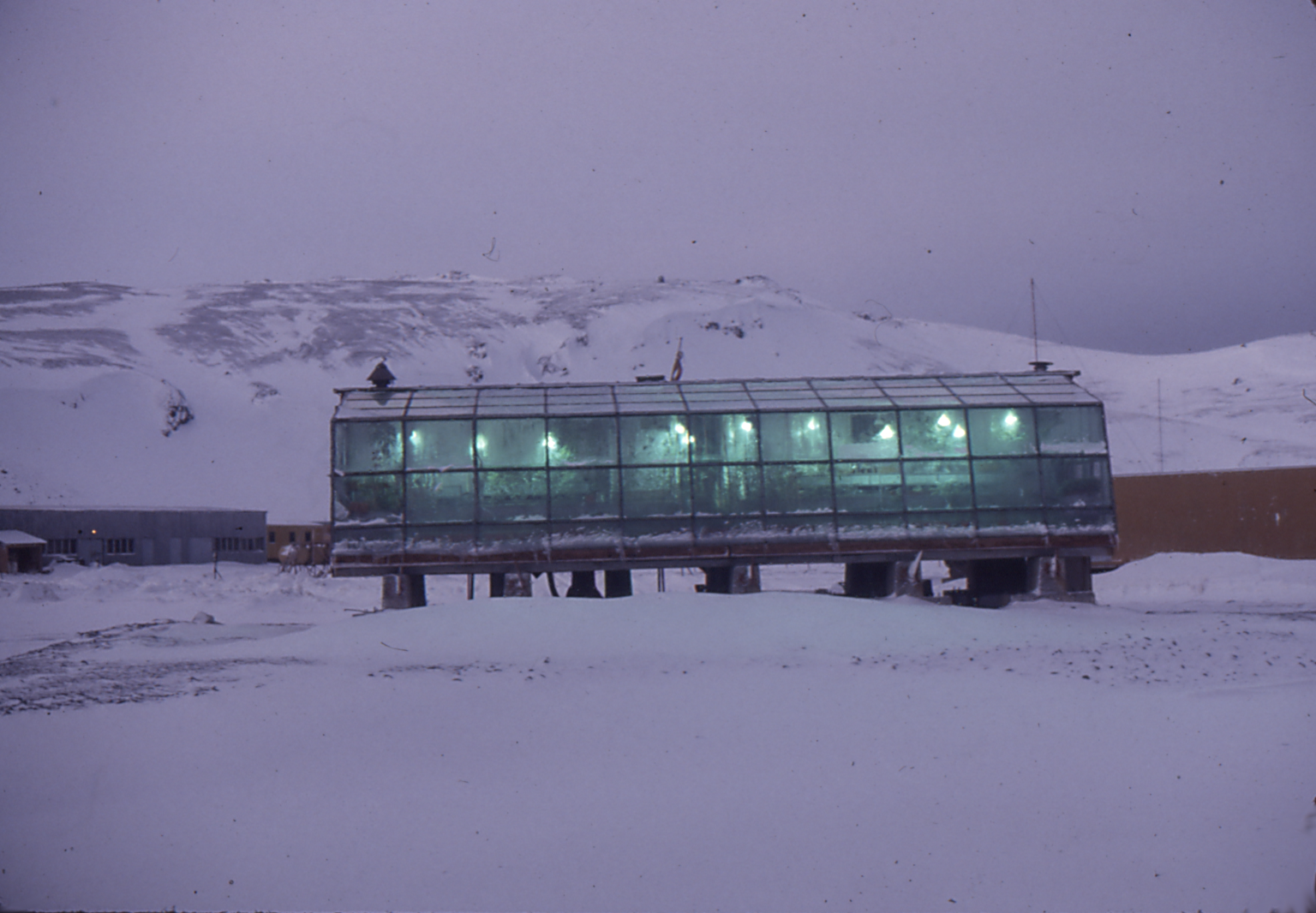 Antiguo invernadero de la Base Henryk Arctowsk en 1984